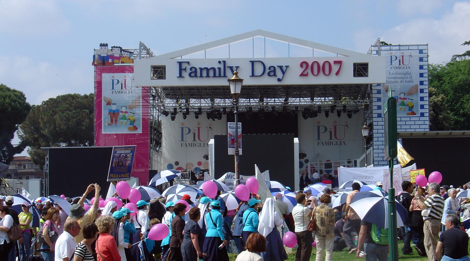 The Family Day, un evento tenutosi a Roma, piazza San Giovanni, il 27 maggio 2007